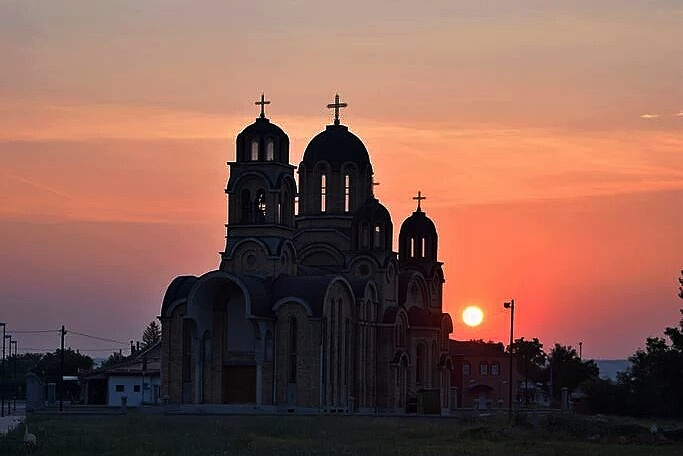 Ово је фотографија заштићеног природног добра у Србији под шифром: СП321 This is a a photo of a natural area in Serbia with ID: СП321 Црква Светог Вазнесења Господњег